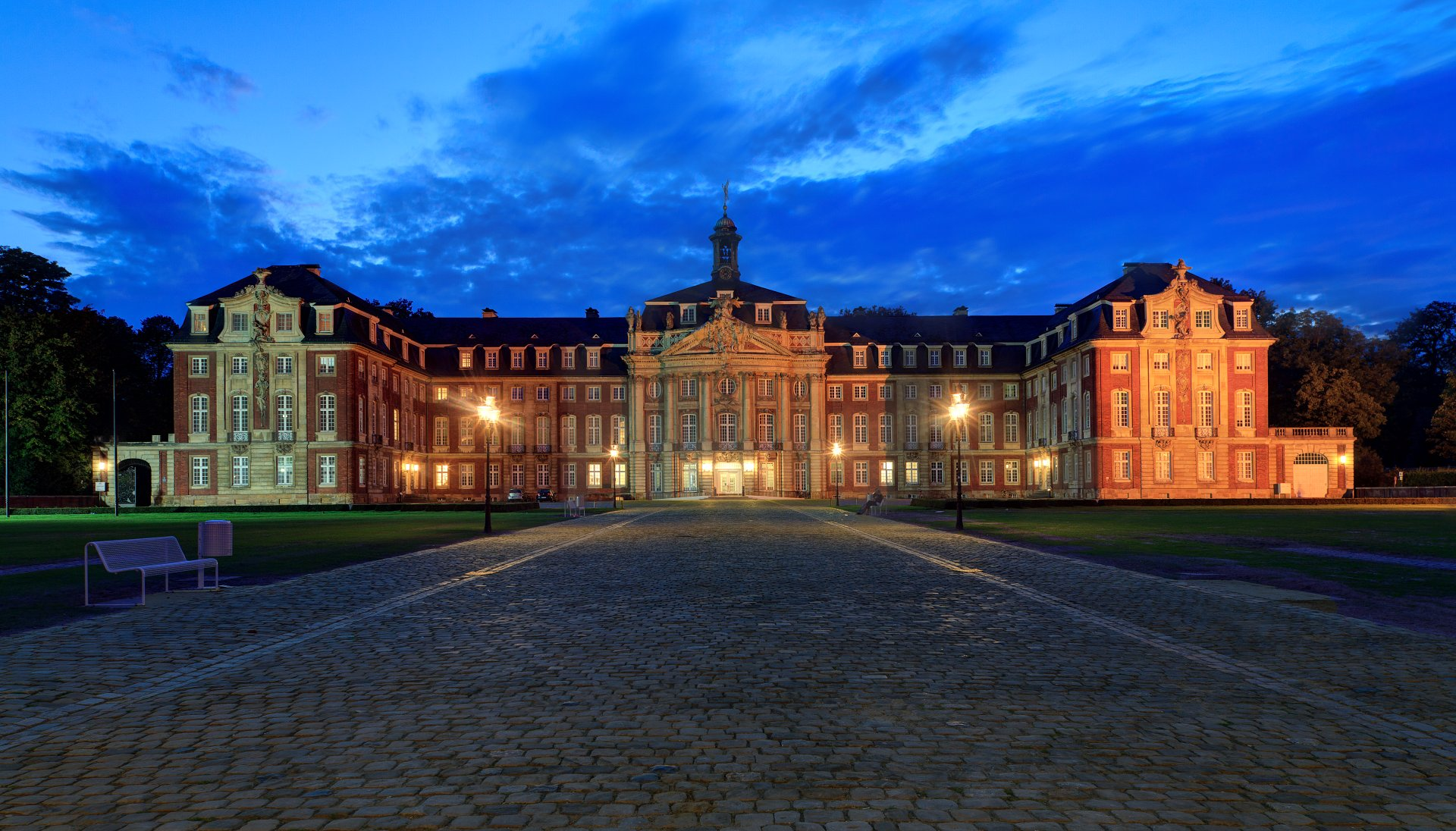 Das fürstbischöfliche Schloss, Sitz und Wahrzeichen der Westfälischen Wilhelms-Universität